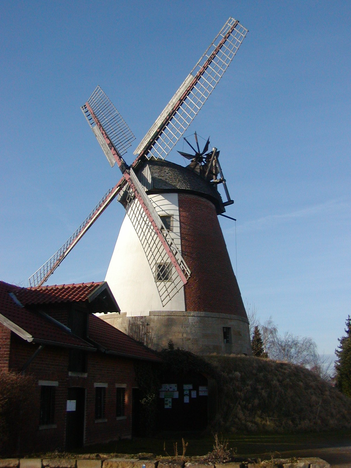 Windmühle in Meißen bei Minden, Nordrhein-Westfalen. Die Mühle ist Teil der Westfälischen Mühlenstraße. Der Wallholländer stammt aus dem Jahr 1869 und ist nach der Restaurierung mit Segelgatterflügeln und einer Windrose ausgestattet. Seit den 1930er Jahren wurde die Mühle mit einem Motor angetrieben, deshalb wurde die Windanlage nach einem Sturmschaden 1941 komplett abgebaut und erst mit der Aufnahme in das Mühlenprogramm des Kreises wieder angebaut. Die Technik ist bis auf einem elektrisch angetriebenen Steinschrotgang nicht mehr vorhanden, die Mühle hat eine stählerne Flügelwelle und ein Rollenlager als Halslager, das ansonsten selten im Denkmalschutz eingesetzt wird.